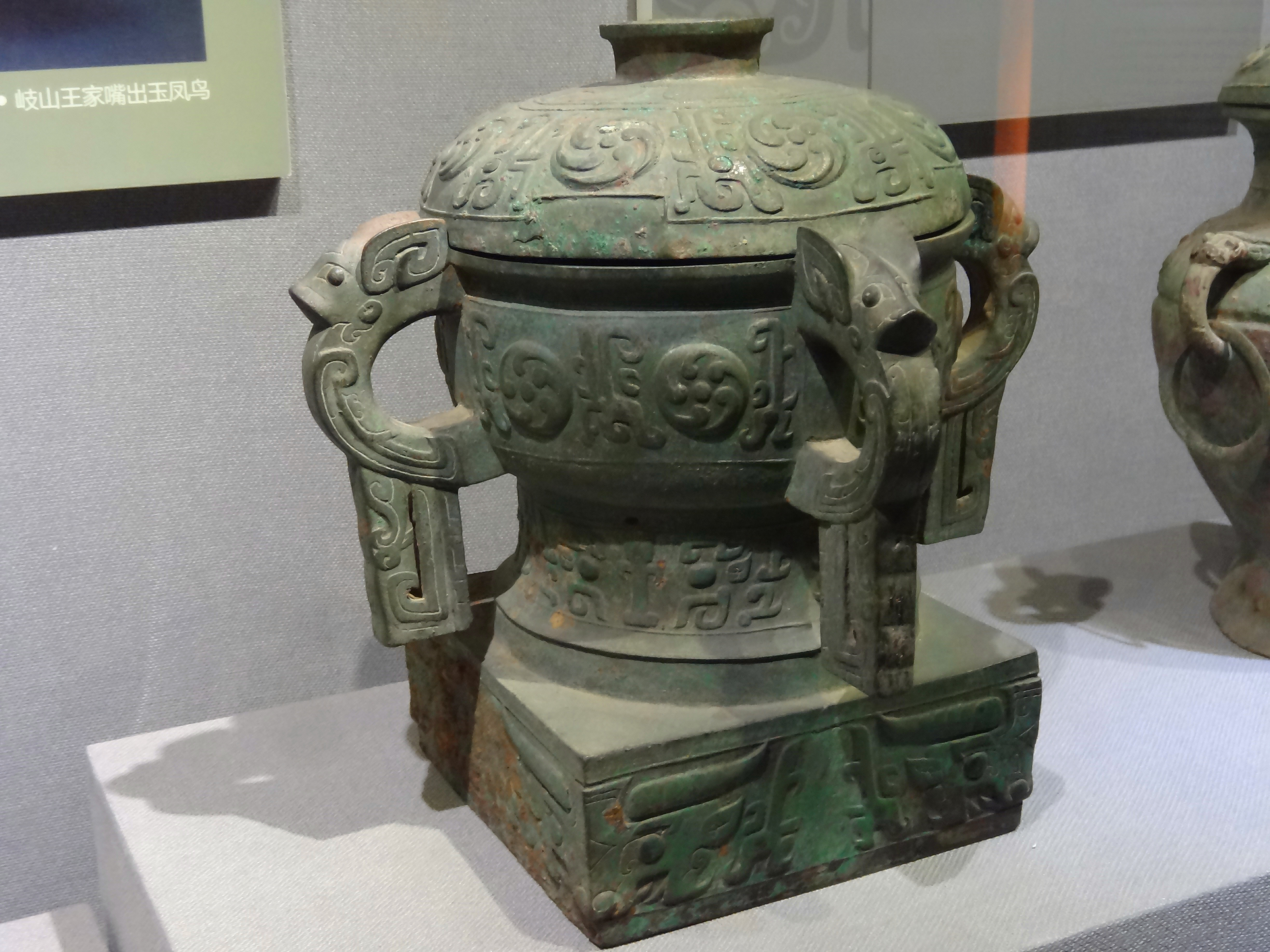 𢐗伯四耳方座簋，西周早期，1981年宝鸡纸坊头出土